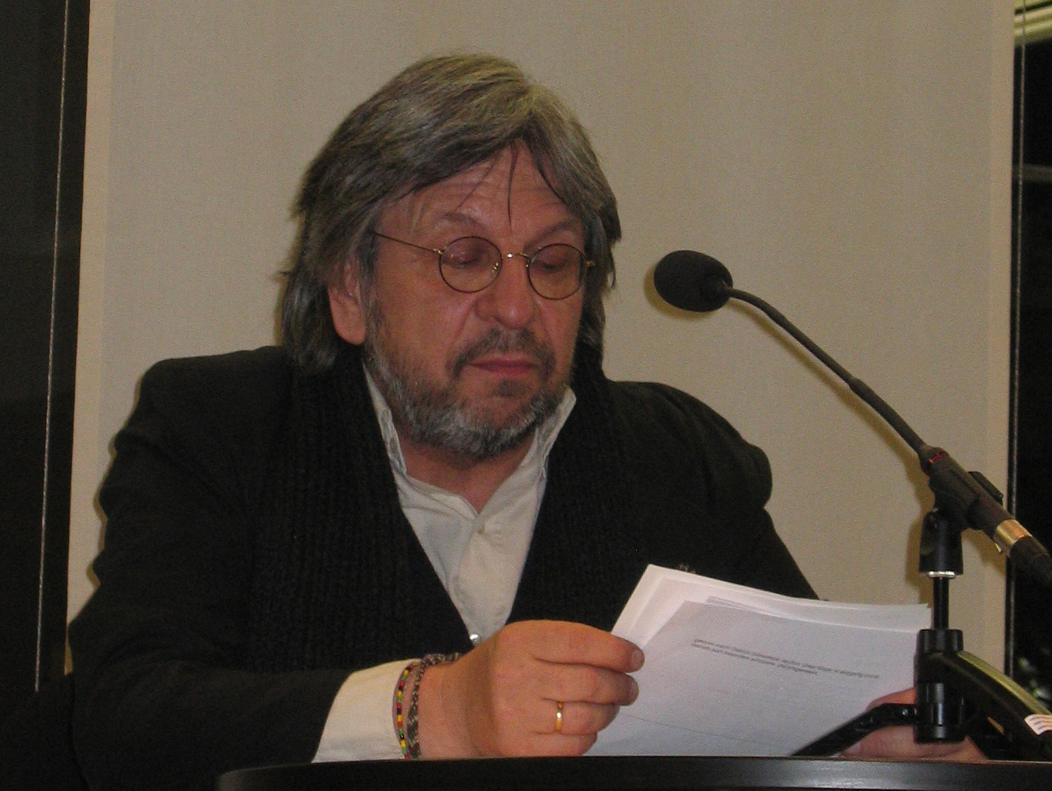 Der Autor Jochen Arlt bei einer Lesung in der Kölner Stadtbücherei